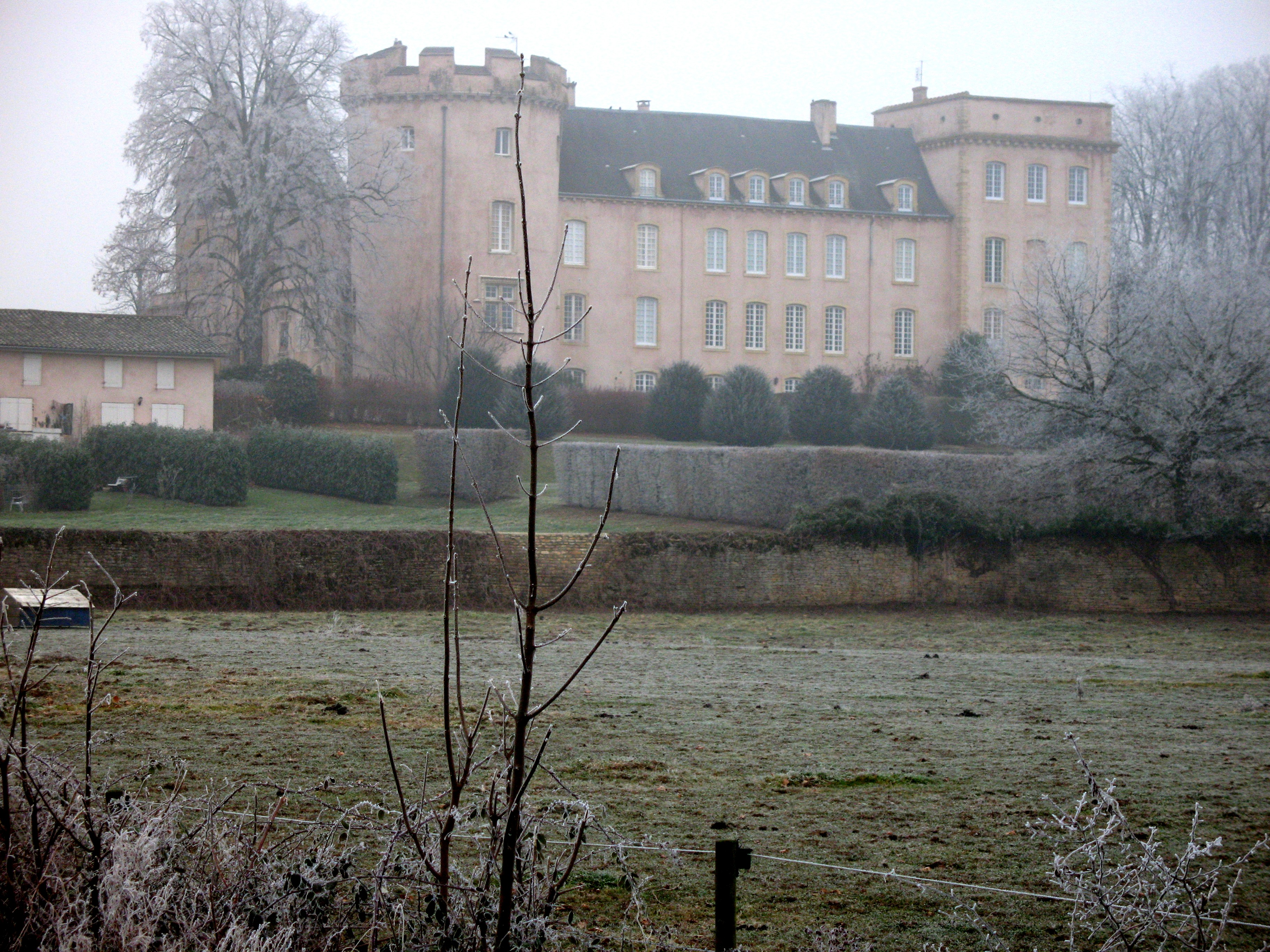 château de Chaintré - Crèches-sur-Saône (Saône-et-Loire)